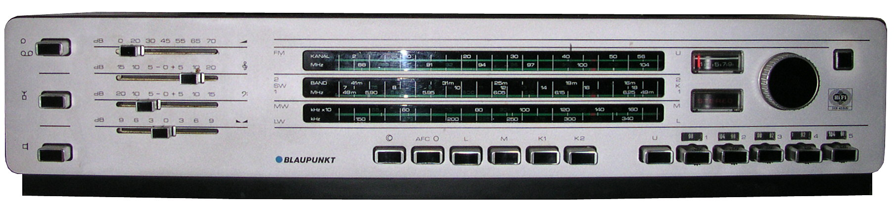 Blaupunkt Hifi-Receiver STG 2091, Leistung 2 x 15 Sinus, 5 UKW-Stationstasten (1971 bis 1973)